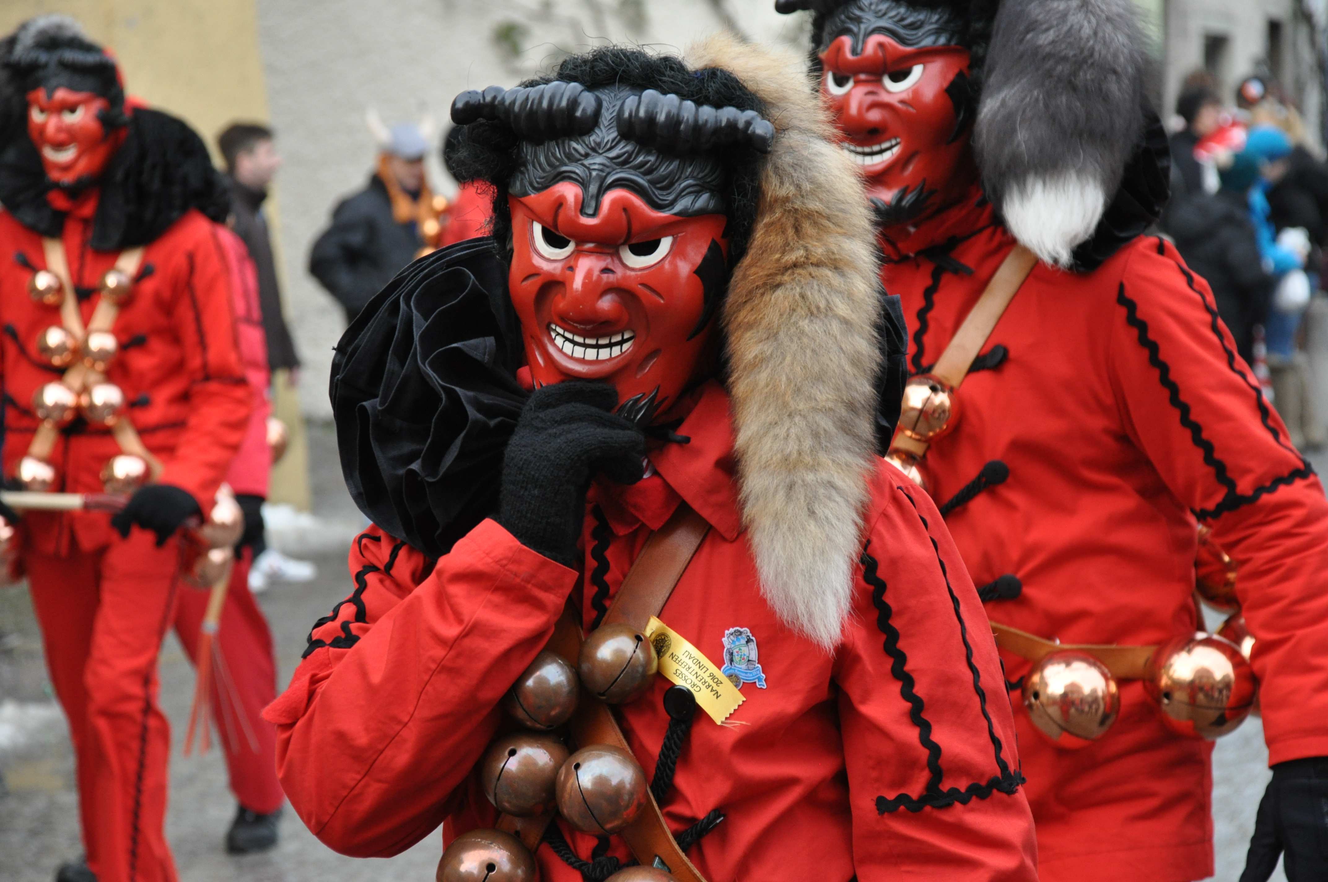 Narrenzunft Triberg; Narrenfigur: Teufel Fotografiert beim Großen Narrentreffen der Vereinigung Schwäbisch-Alemannischer Narrenzünfte (VSAN) in Lindau; Narrensprung am Sonntag, 24. Januar 2016.